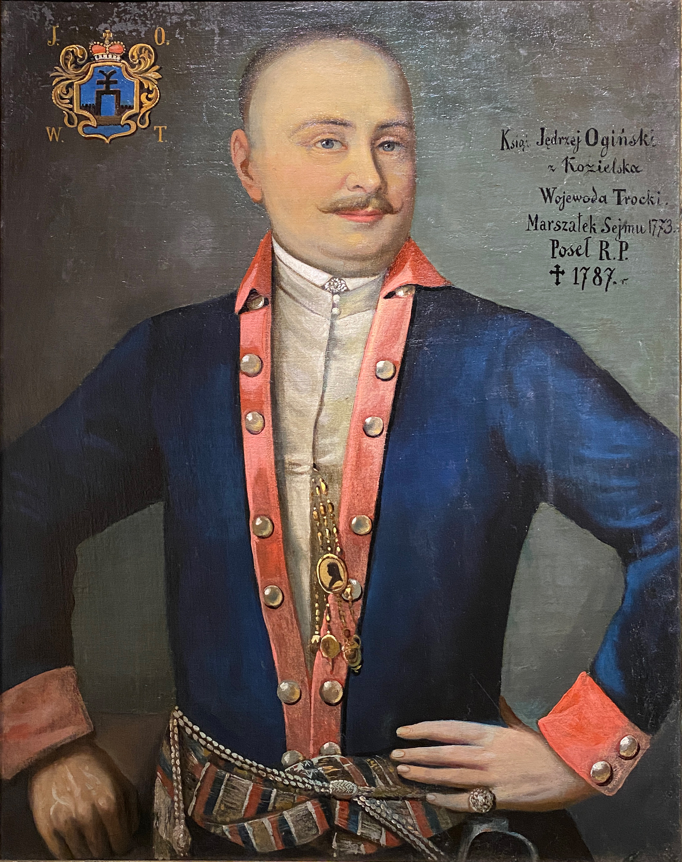 Беларуская (тарашкевіца): Партрэт Андрэя Агінскага (Andrej Aginski)